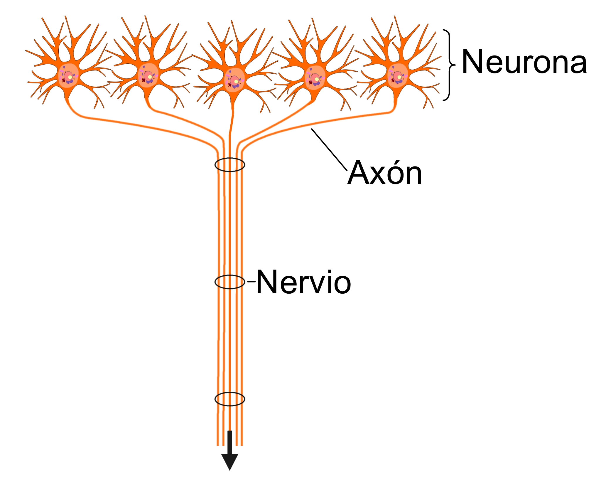 Esquema en el que se muestra la formación de un nervio a partir de los axones procedetes de varias neuronas.